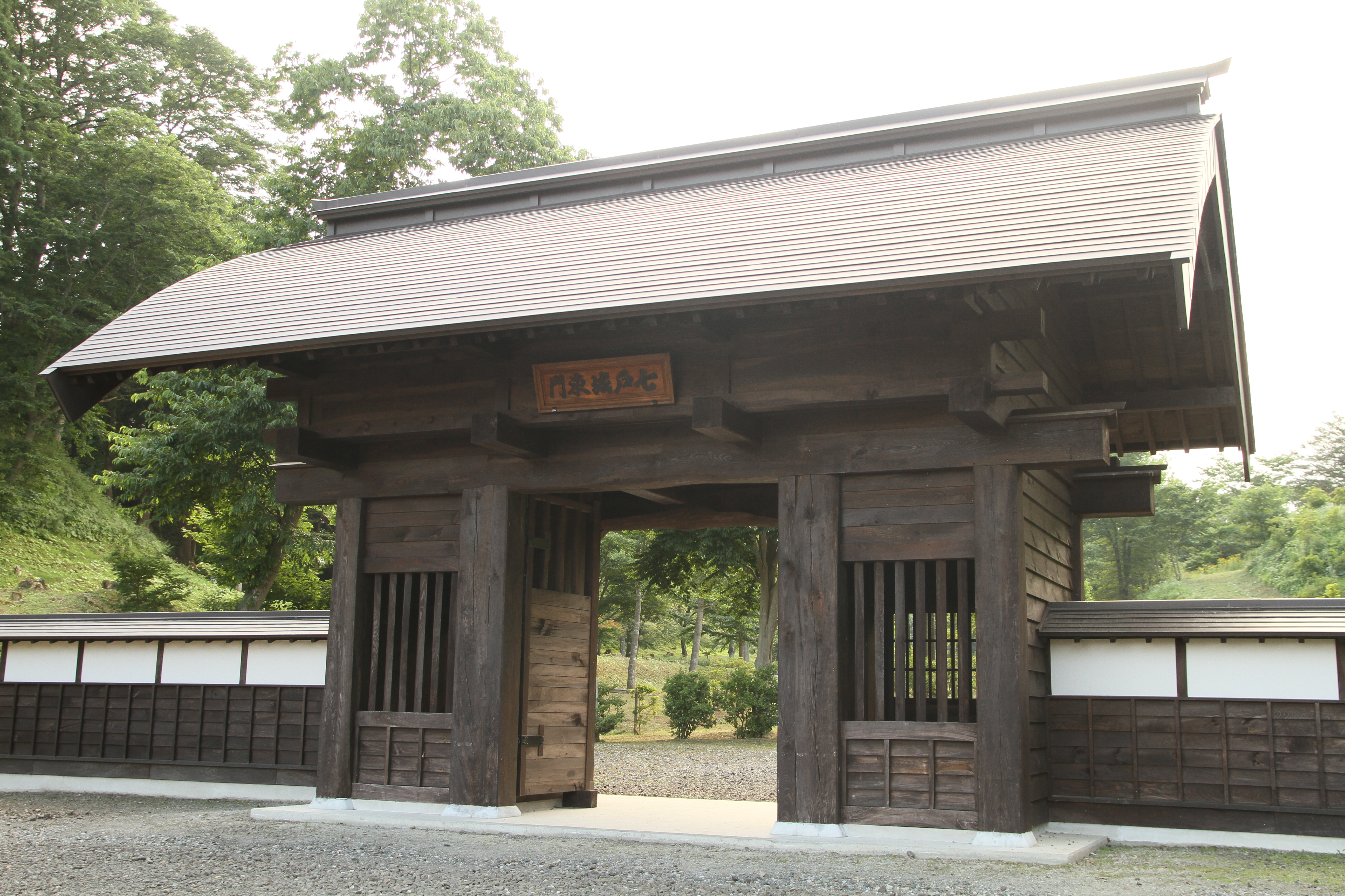 復元された七戸城東門